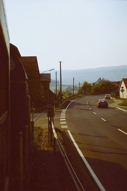 Nahverkehrszug auf der Bahnstrecke Bad Neustadt–Bischofsheim in Wegfurt